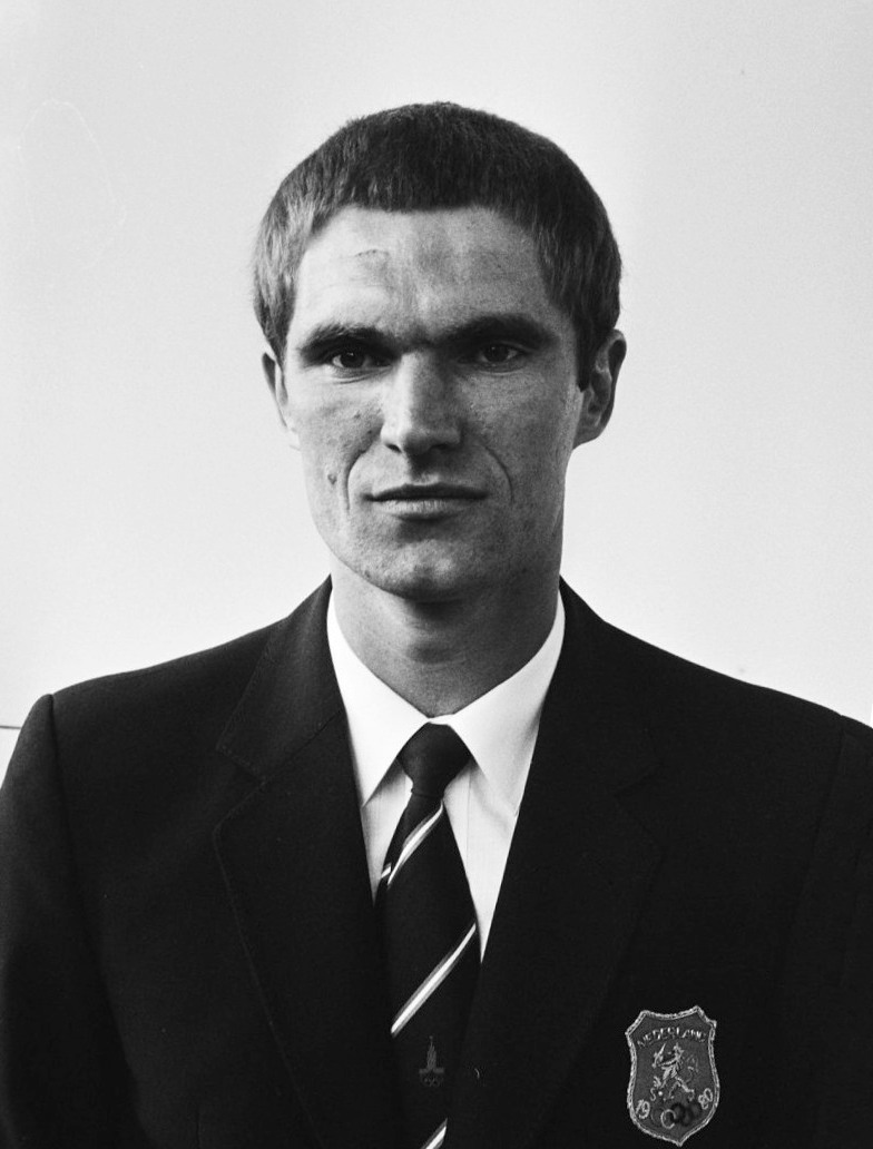 Vertrek Olympische schuttersploeg van Schiphol naar de zomerspelen in Moskou. Ruud Misdorp